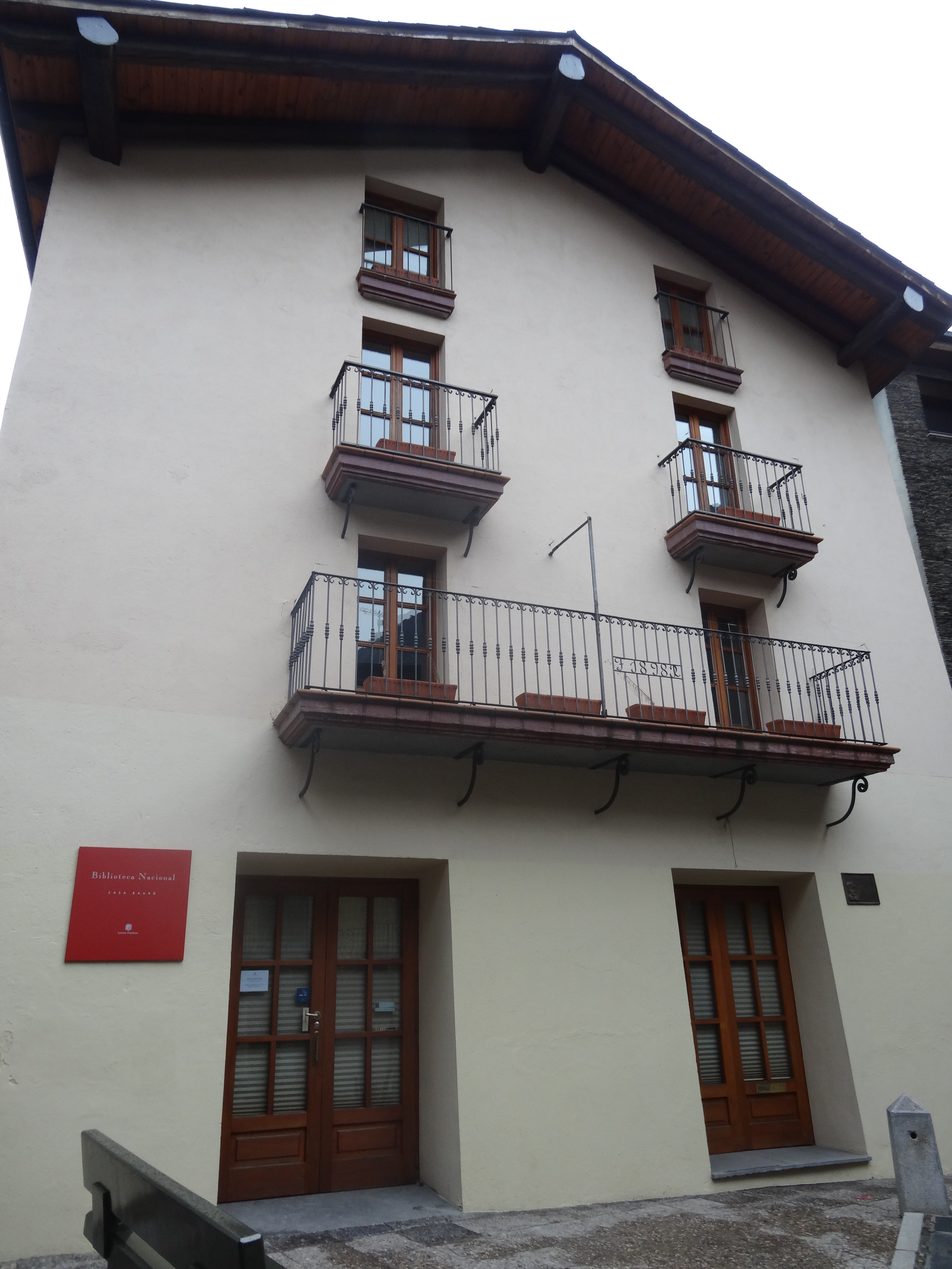 Casa Bauró, seu de la Biblioteca Nacional d'Andorra